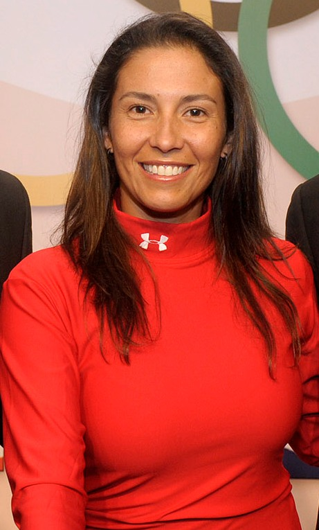 Denisse van Lamoen, arquera chilena.